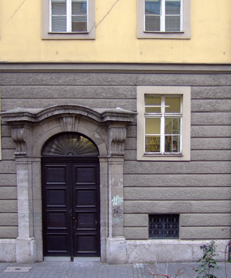 Altes Stadthaus, Bonn: Fassadengestaltung